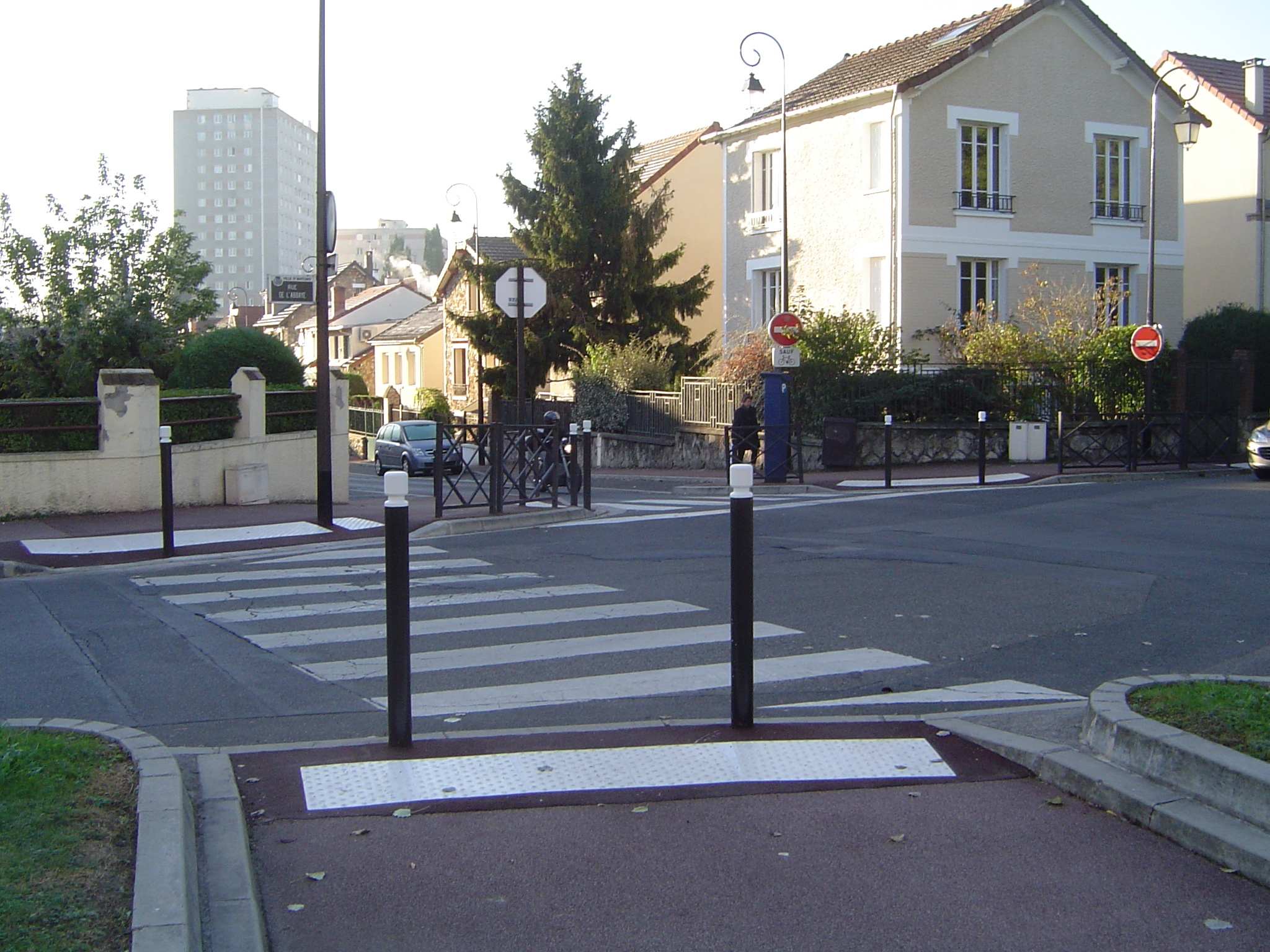 Photo prise à Antony (France)